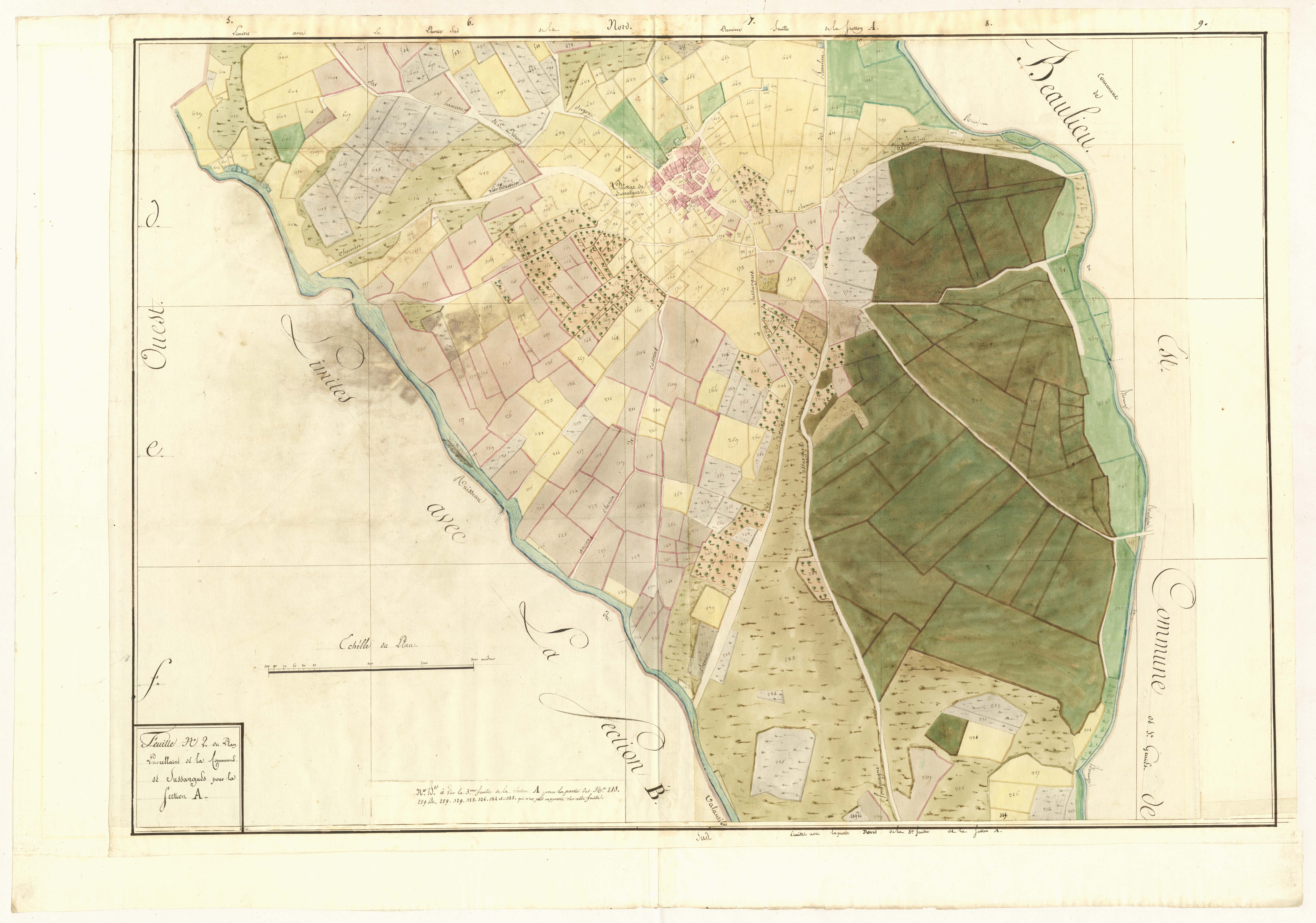 Sussargues. - Cadastre napoléonien : plan de la section A2 du Village, Le Plan, Les Bois et Mouticlergue